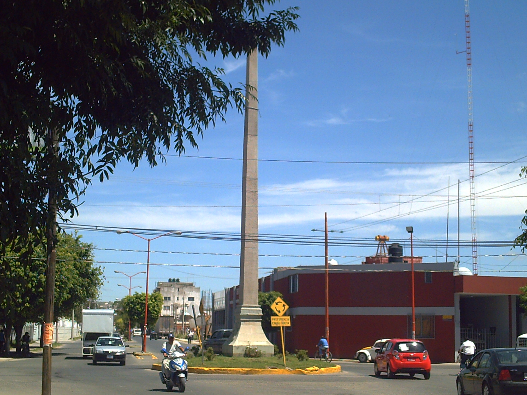 Glorieta del Obelisco, al fondo (edificio rojo) la Estación de Bomberos de San Francisco del Rincón